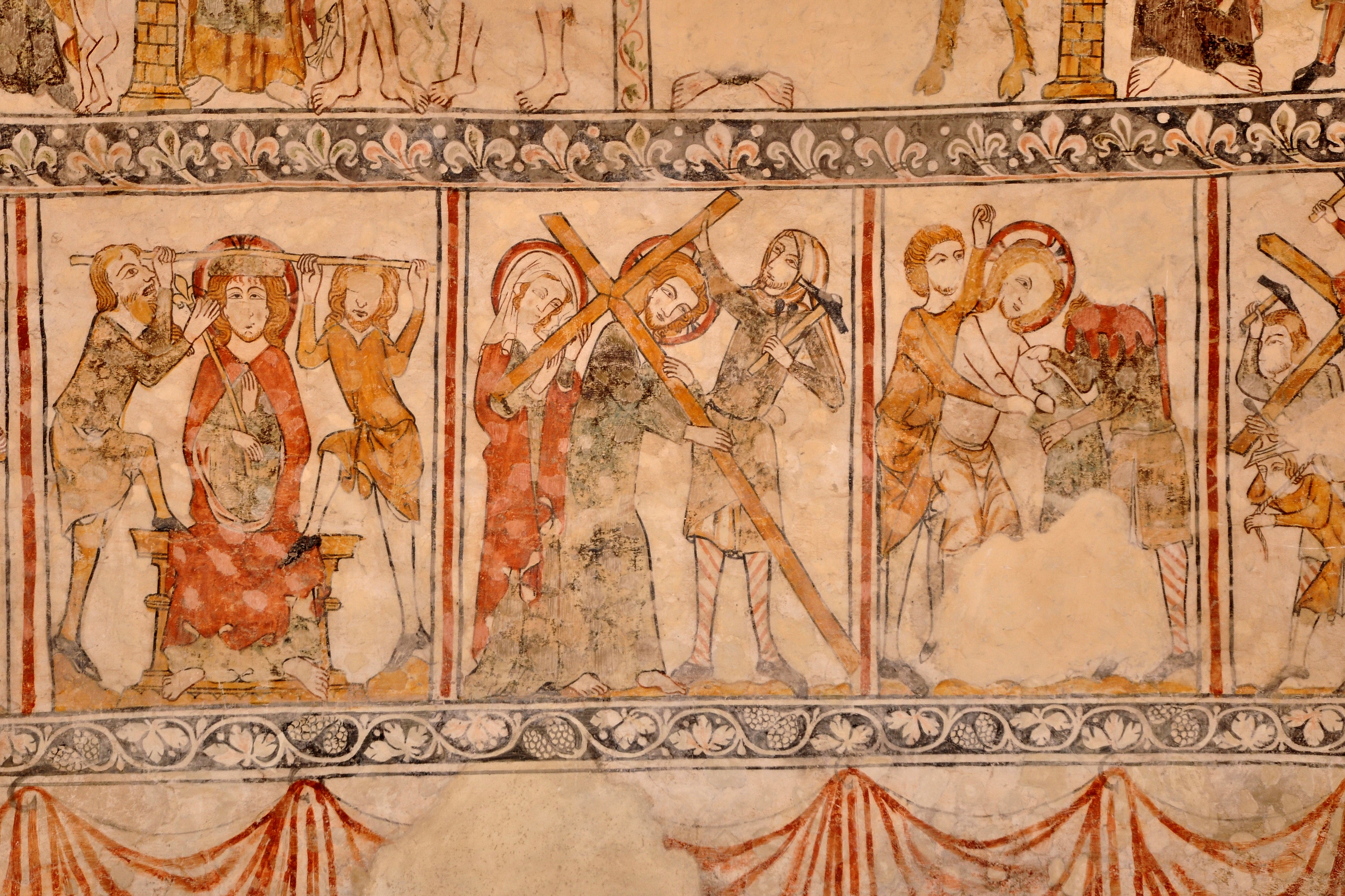 Reformierte Galluskapelle, Chilenbückli in Oberstammheim (Switzerland)